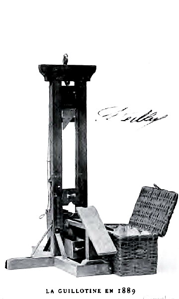 gravure d'une phoyographie d'un modèle réduit de guillotine (avec autographe de Deibler)